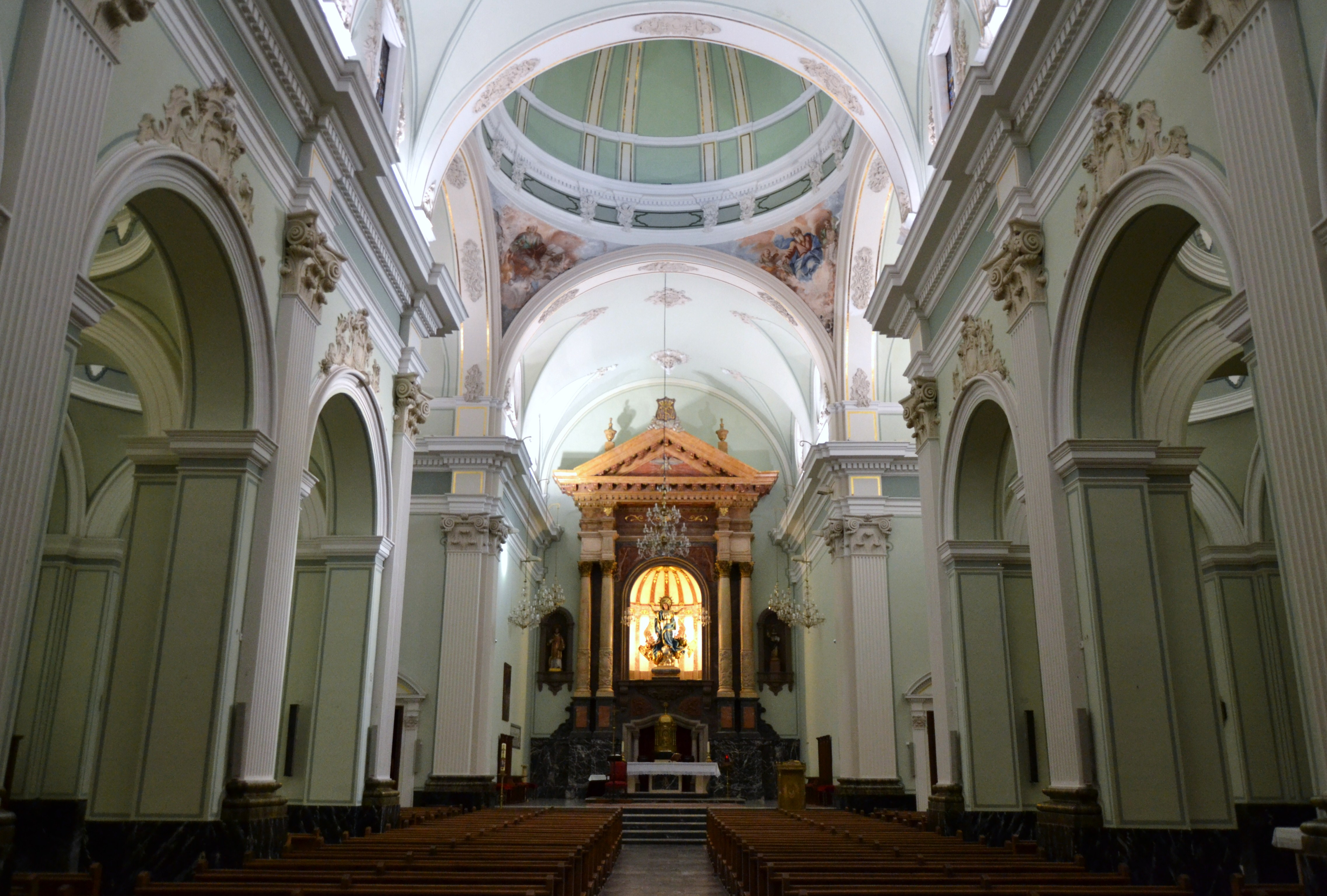 Interior de l'església de l'Assumpció de Dénia, Marina Alta.